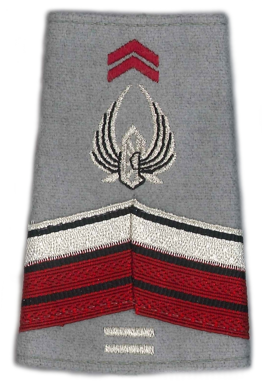 Fourreau d'épaule de brigadier-chef du régiment de soutien du combattant RSC